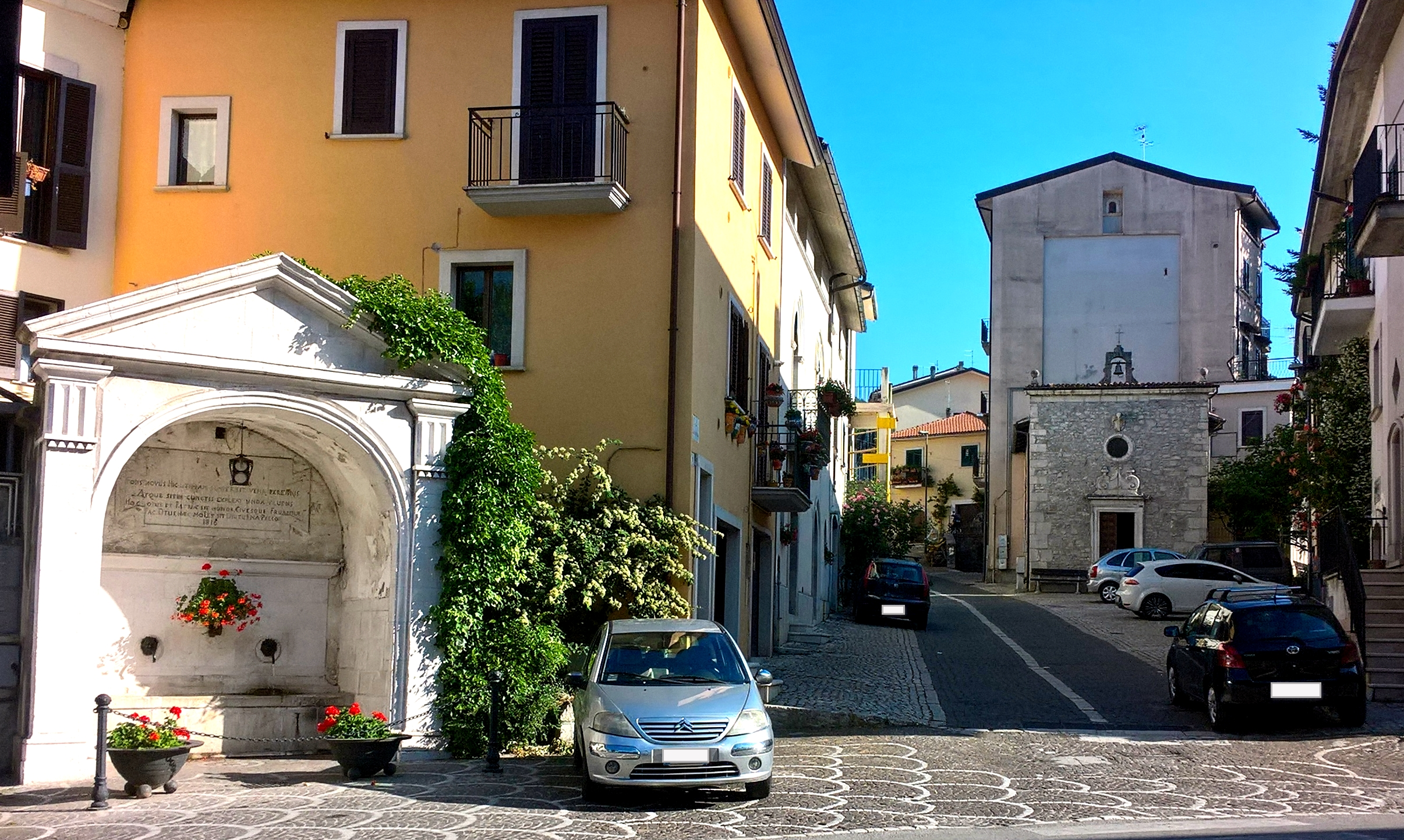 Chiesa di San Filippo Neri